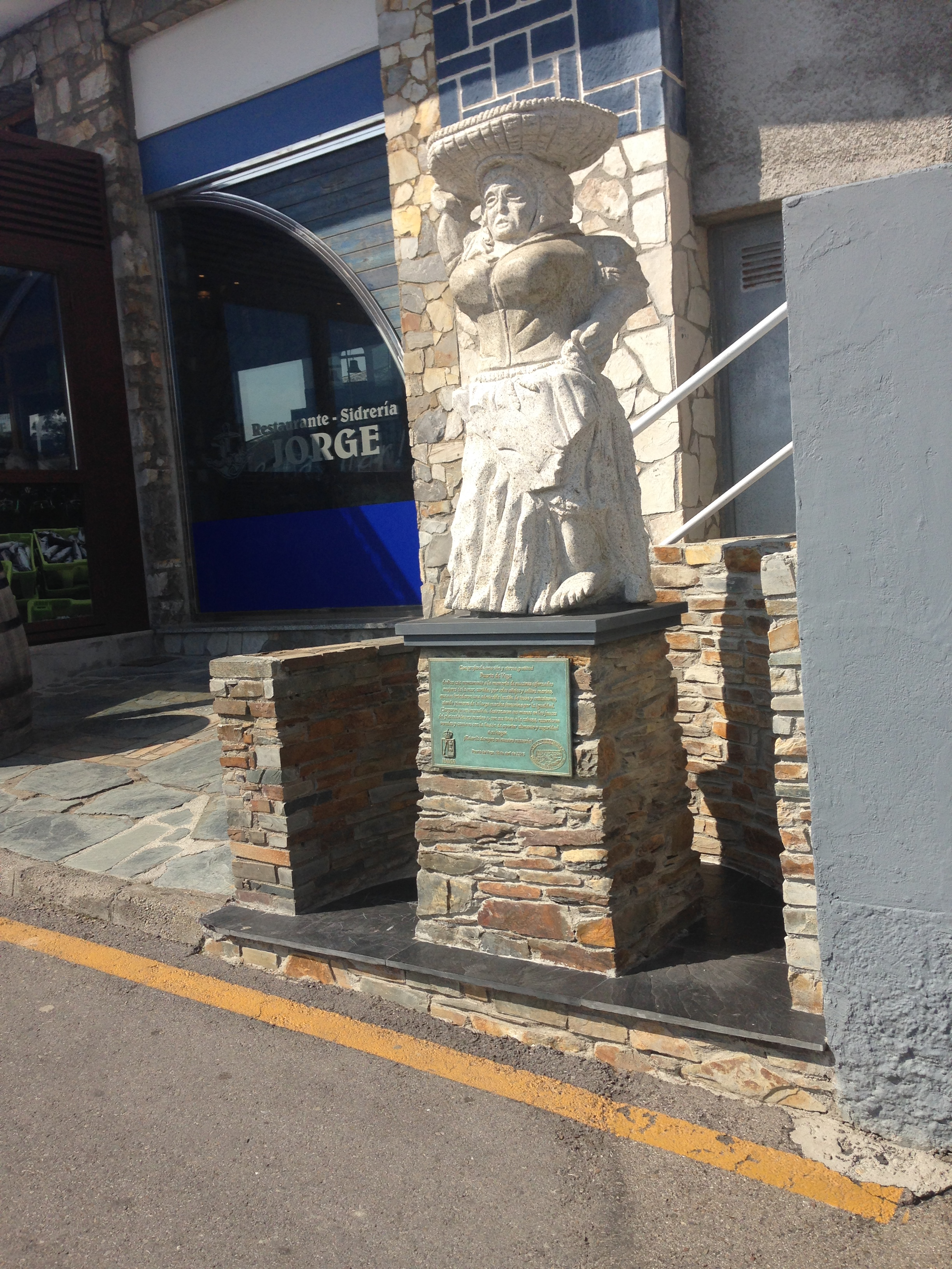 Puerto de Vega, Premio Príncipe de Asturias, Pueblo Ejemplar en 1995